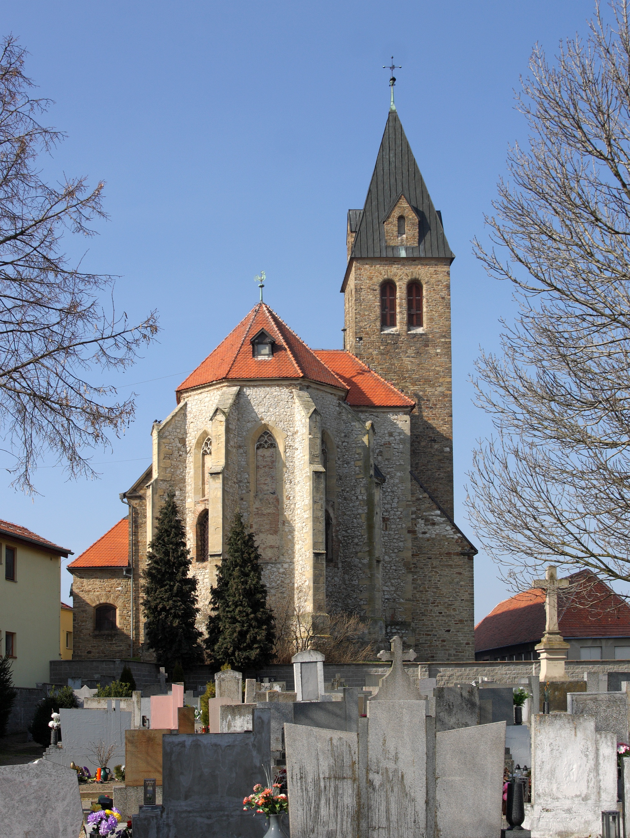 Zaječí - kostel sv Jana Křtitele.